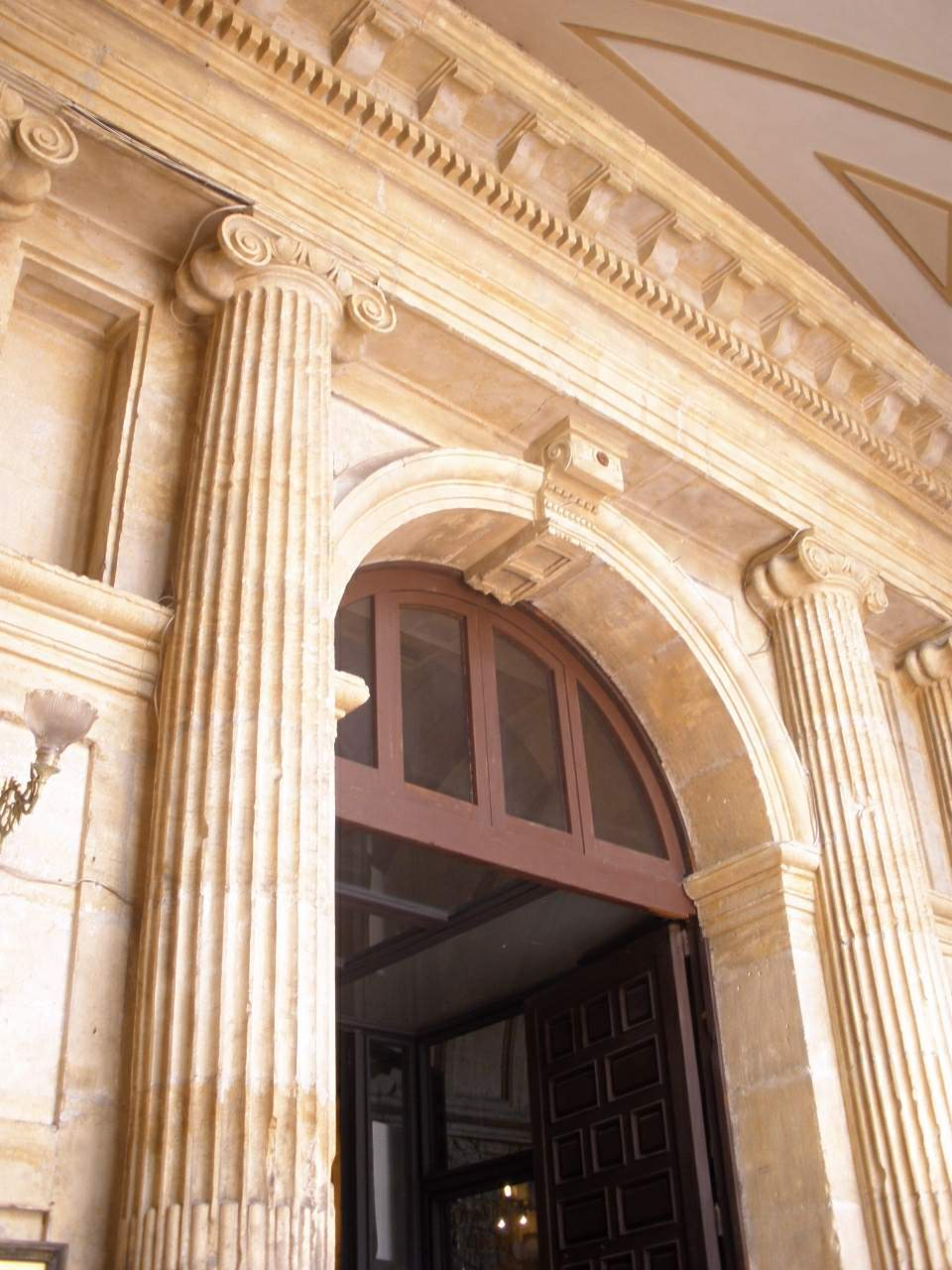 Oviedo - Iglesia de Santa María la Real de la Corte (ex Monasterio de San Vicente)